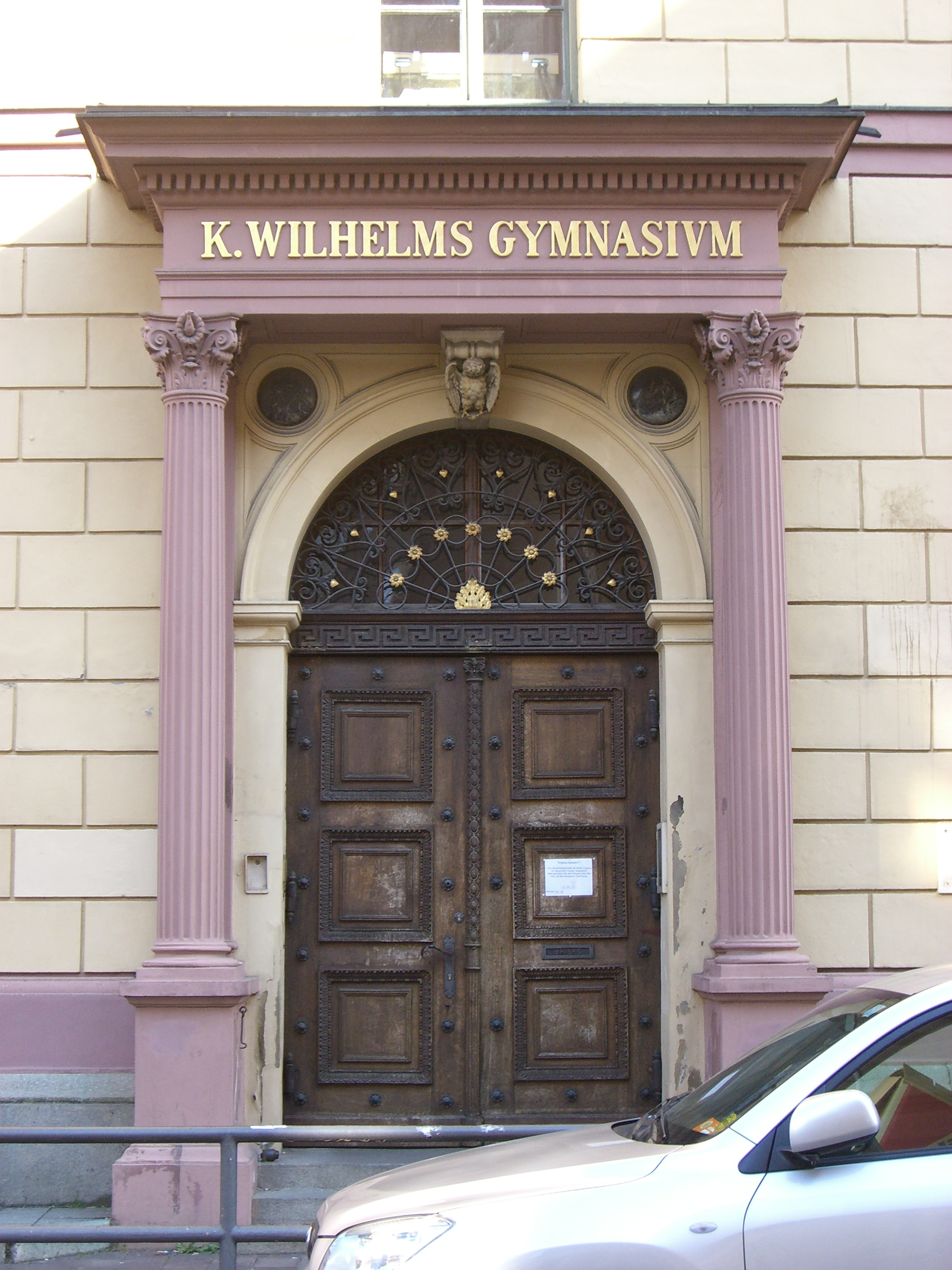 Wilhelmsgymnasium München (Eingang)